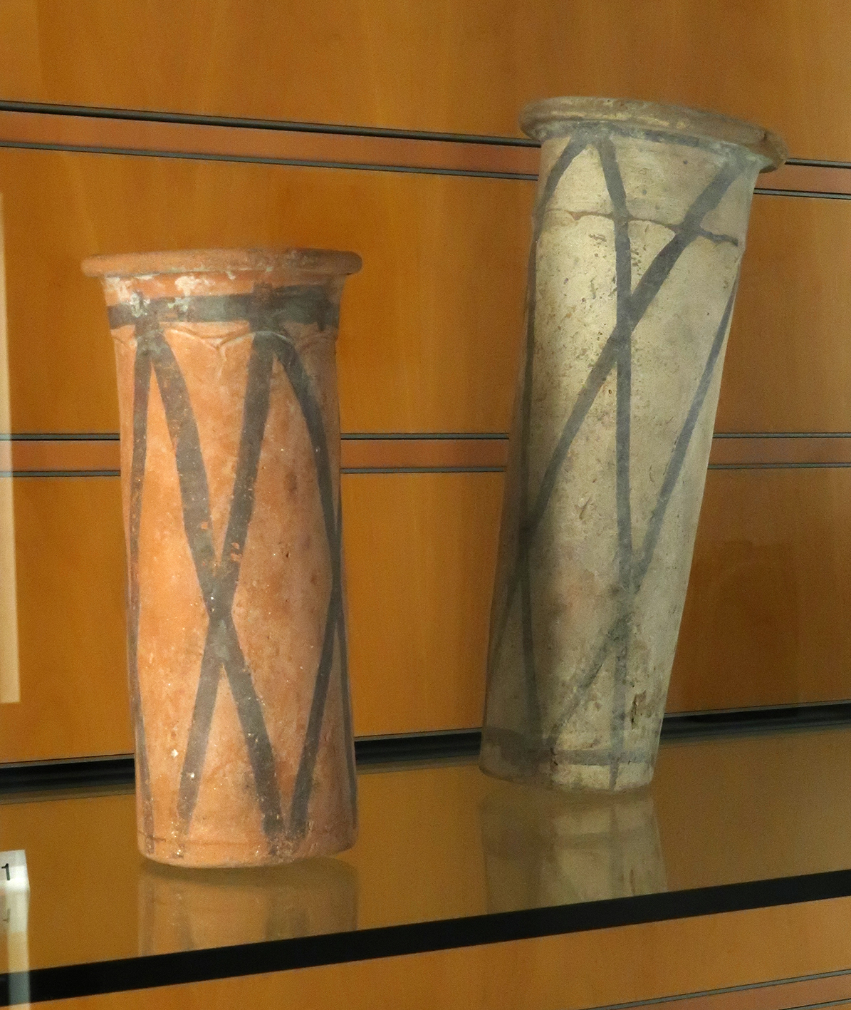 Vases cylindriques à décor en filet. Nagada II. Céramique peinte. À gauche, Inv. 1972-1 : Hauteur 21 cm, Diamètre 10,3 cm. Terre cuite à légers reliefs en arceaux sous l'ouverture, et décor en croisillons peints en noir. Entré au musée en 1969/70. À droite, Inv. 1974-164. Terre cuite à reliefs similaires, peinte en blanc et décor en croisillons noirs.